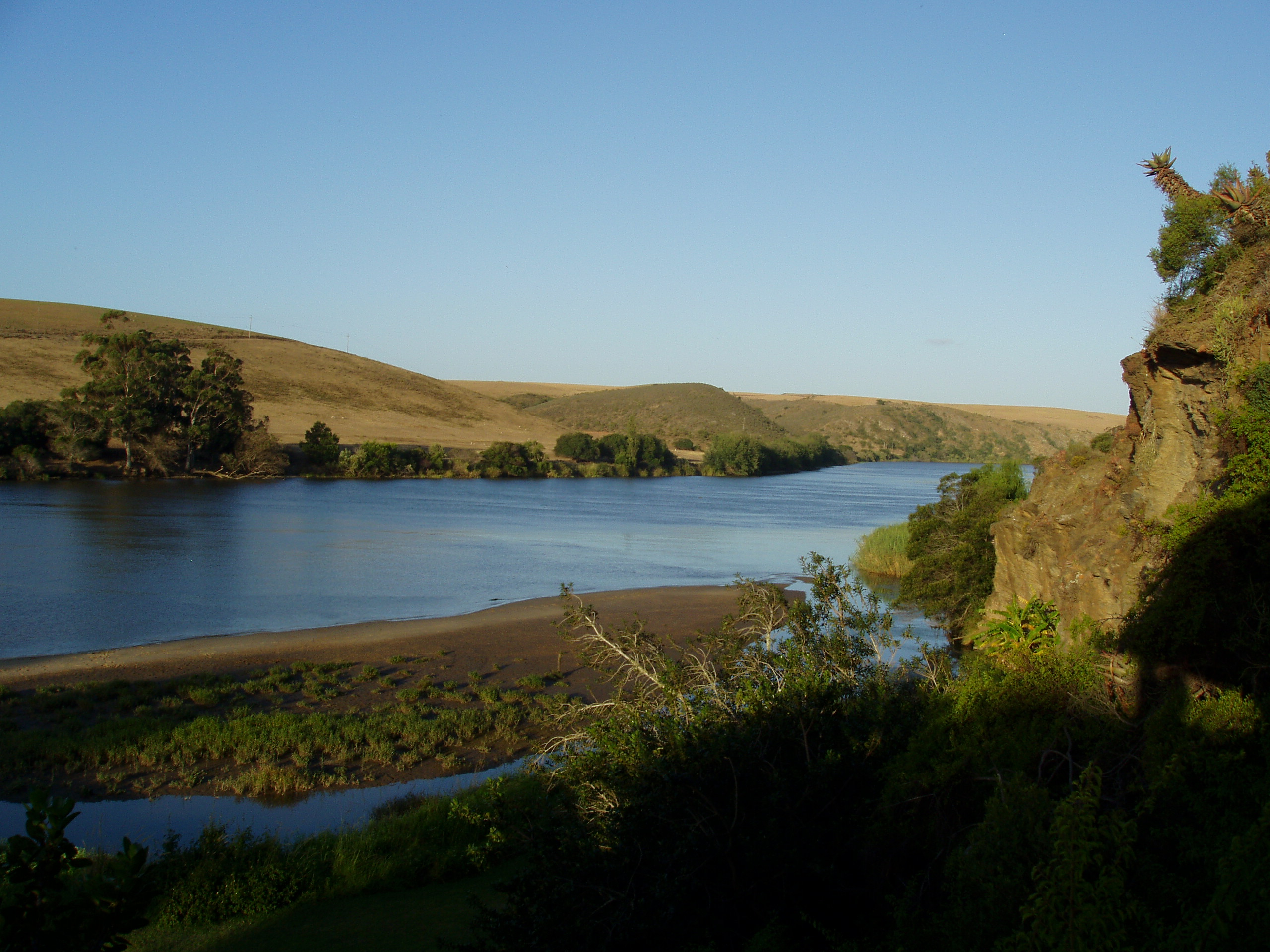 Breeede River, Western Cape